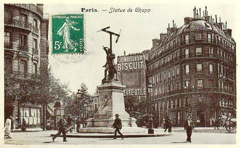 Carte postale de 1908 de la statue de Claude Chappe à Paris, à la jonction de la rue du Bac et des boulevards Raspail et Saint-Germain. Elle a été fondue en 1941, sous l'Occupation.